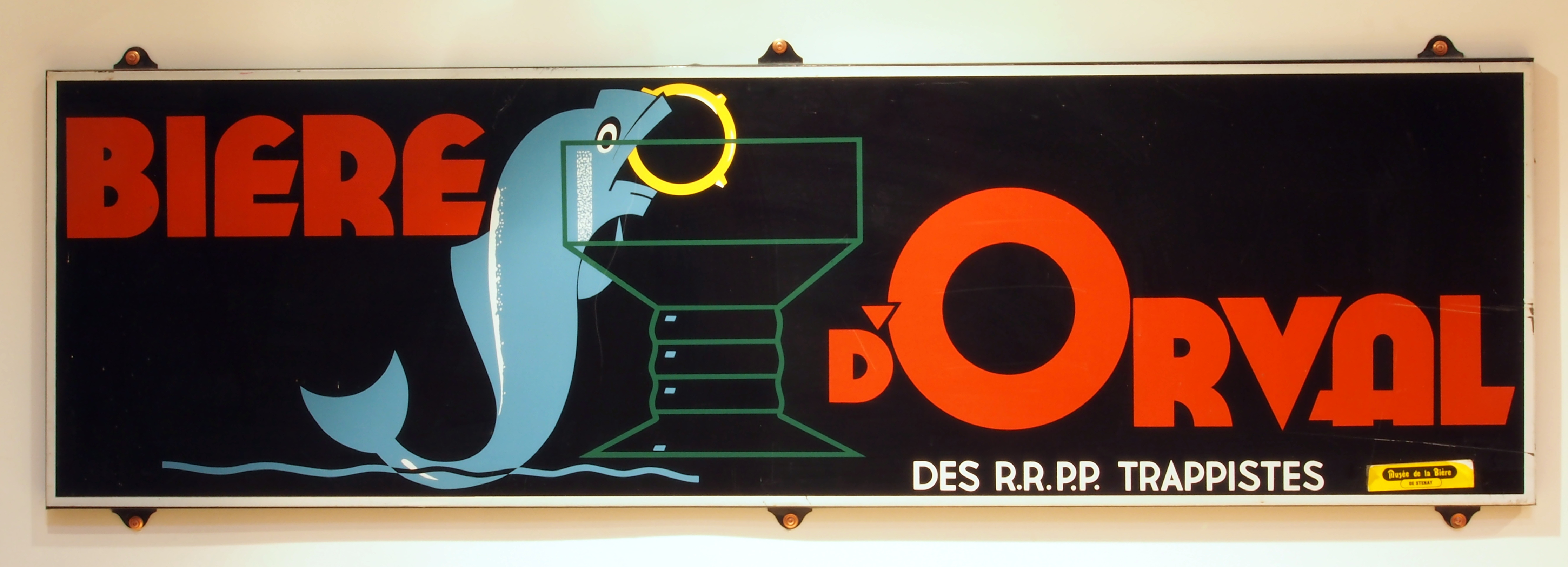 Biere d'Orval des RR. PP. trappistes, enamel advertising sign at the Musée Européen de la Bière